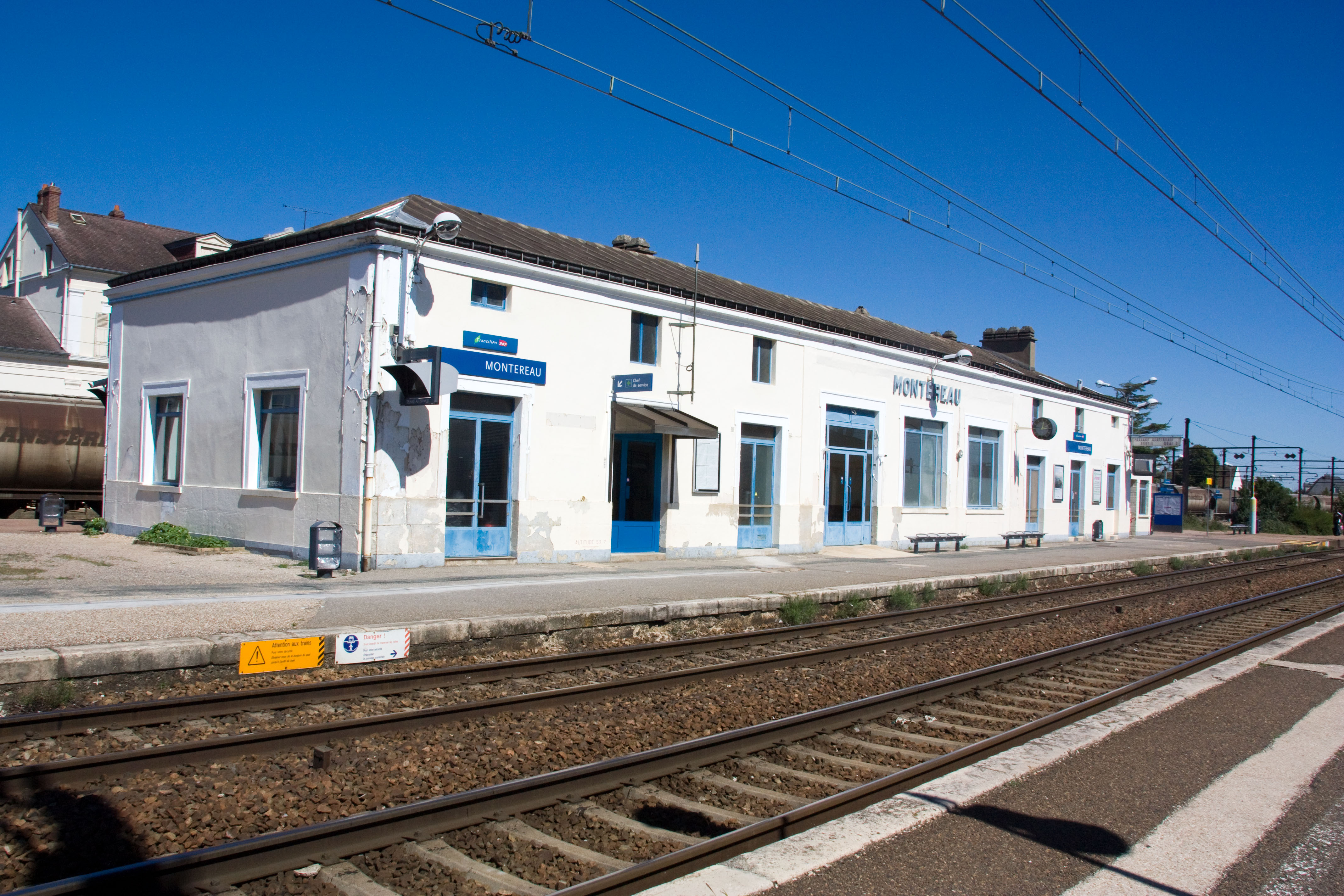 Gare de Montereau, Montereau, Seine-et-Marne, France